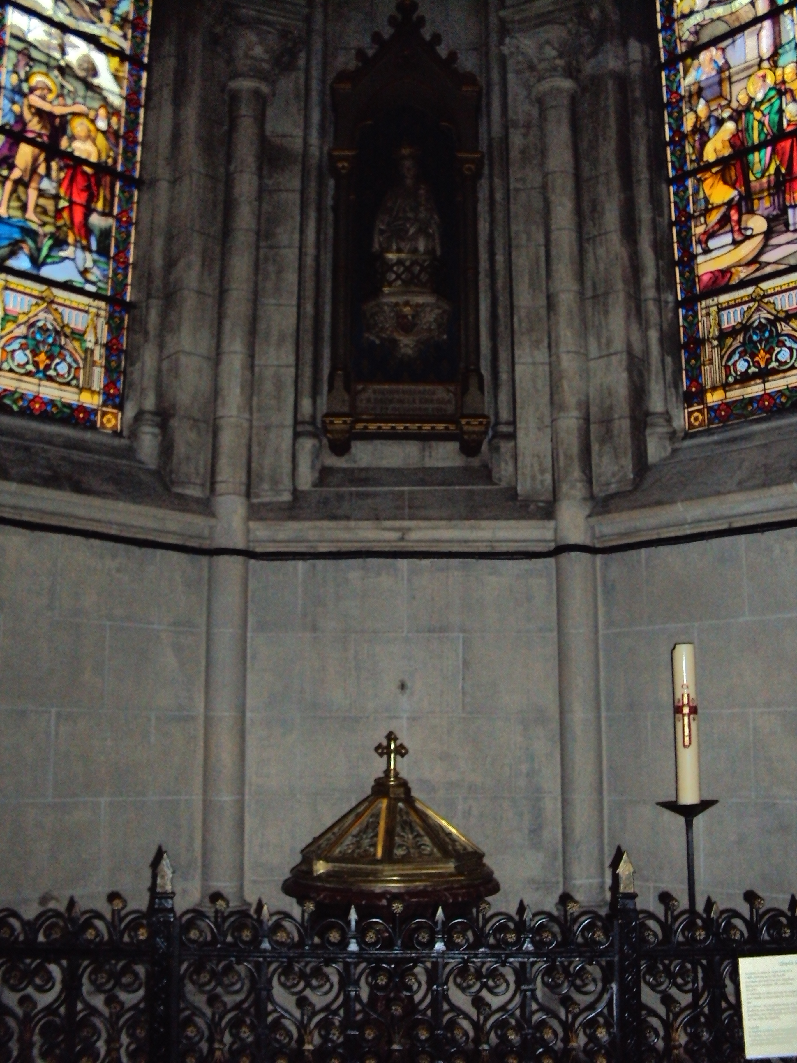 Fonts baptismaux de l'église du Sacré-Cœur de Lille.